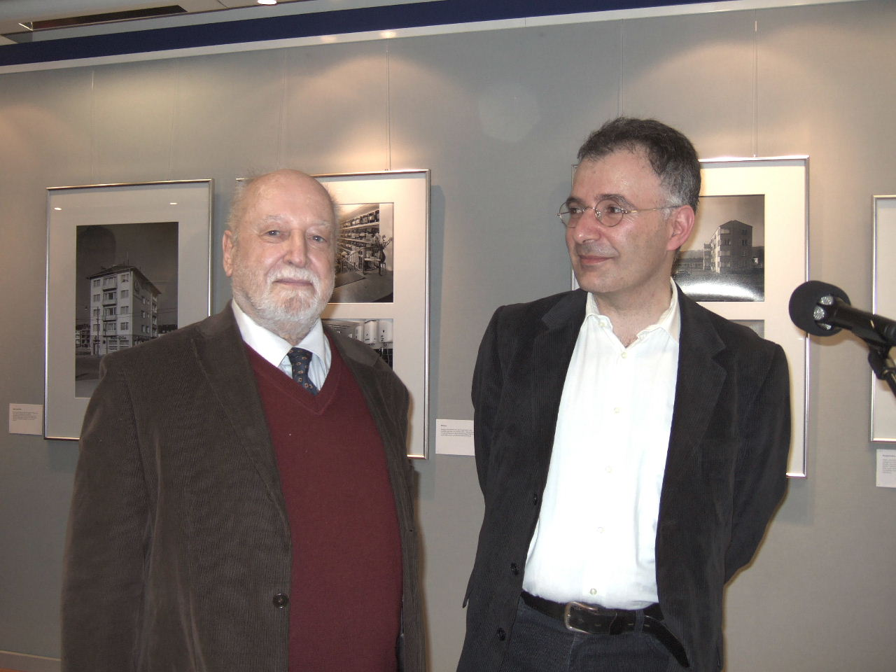 Hans Schafgans und Sohn Boris bei der Eröffnung der Ausstellung ›Häuser - Straßen - Gegenstände‹ - Motive aus der Bonner Nachkriegszeit in der Buchandlung Bouvier in Bonn am 31. März 2006 Aufnahme: 31.3.2006 Url